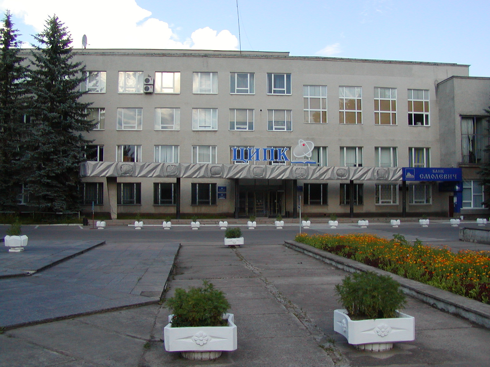 Центральный институт повышения квалификации (ЦИПК) в Обнинске.